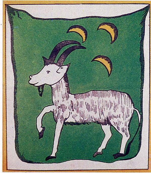 Знамя Абхазского княжества